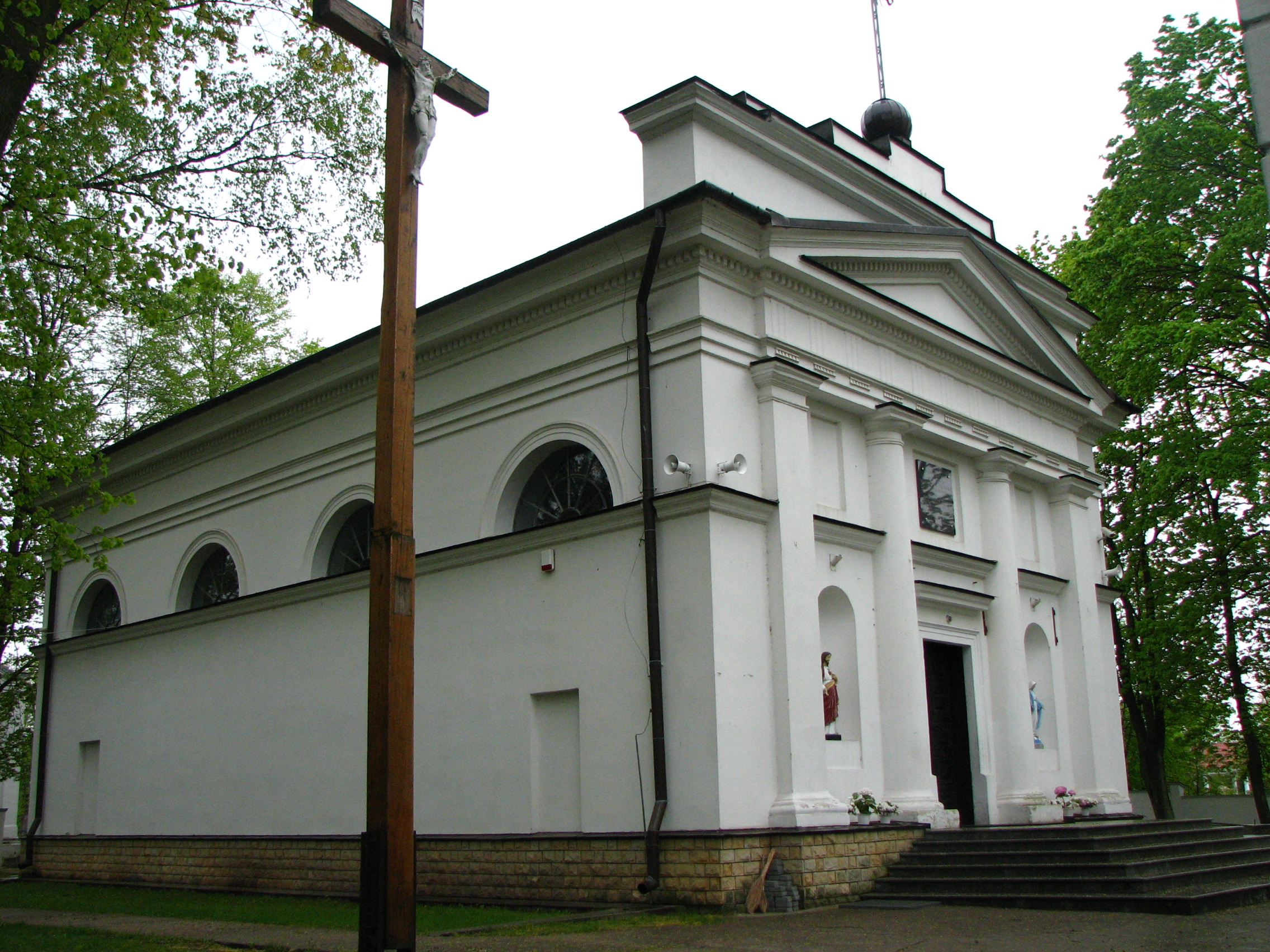 Pratulin - widok na kościół p.w. śś. Piotra i Pawła